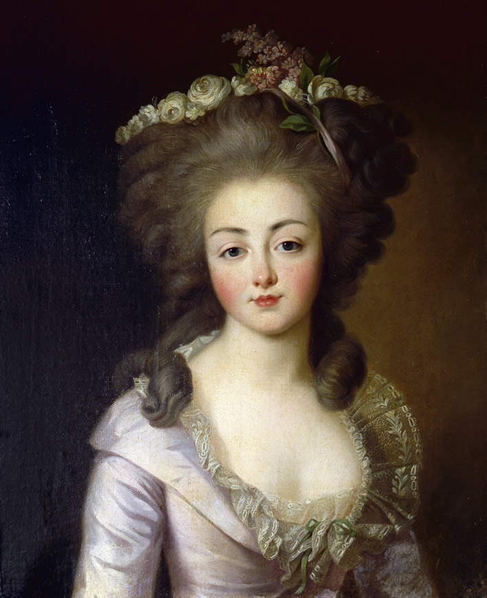 Belle-soeur de Yolande Martine Gabrielle de Polastron, Duchesse de Polignac. Dame d'Honneur de Madame elizabeth, soeur du Duc Armand-Jules de Polignac.